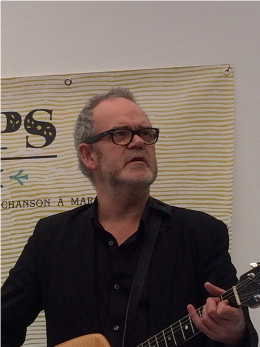 Silvain Vanot, festival Avec le Temps, Librairie Histoire de l'Œil Marseille, 5 mars 2016